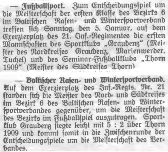 Zapowiedź (u góry) i wynik (na dole) meczu Seminar FC 1909 Thorn i SC Graudenz o mistrzostwo okręgu w rozgrywkach rejonu Zachodniopomorskiego